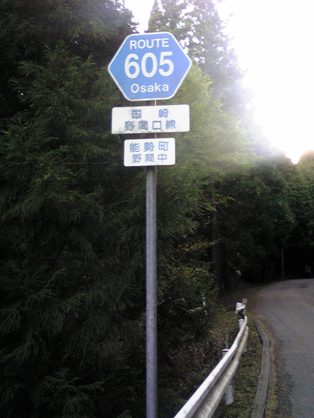 大阪府道605号線 路線番号標識